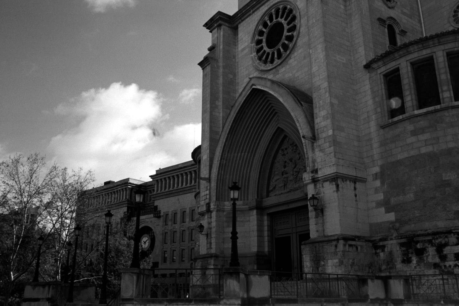 Catedral y Ayuntamiento 2 - Albacete